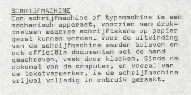 Als illustratie voor het artikel over de typemachine heb ik de inleiding getypt.